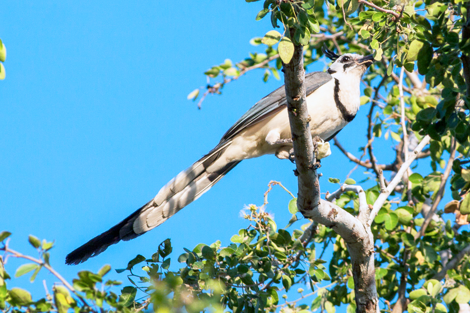 Journey to La Barra de Navidad,Jalisco